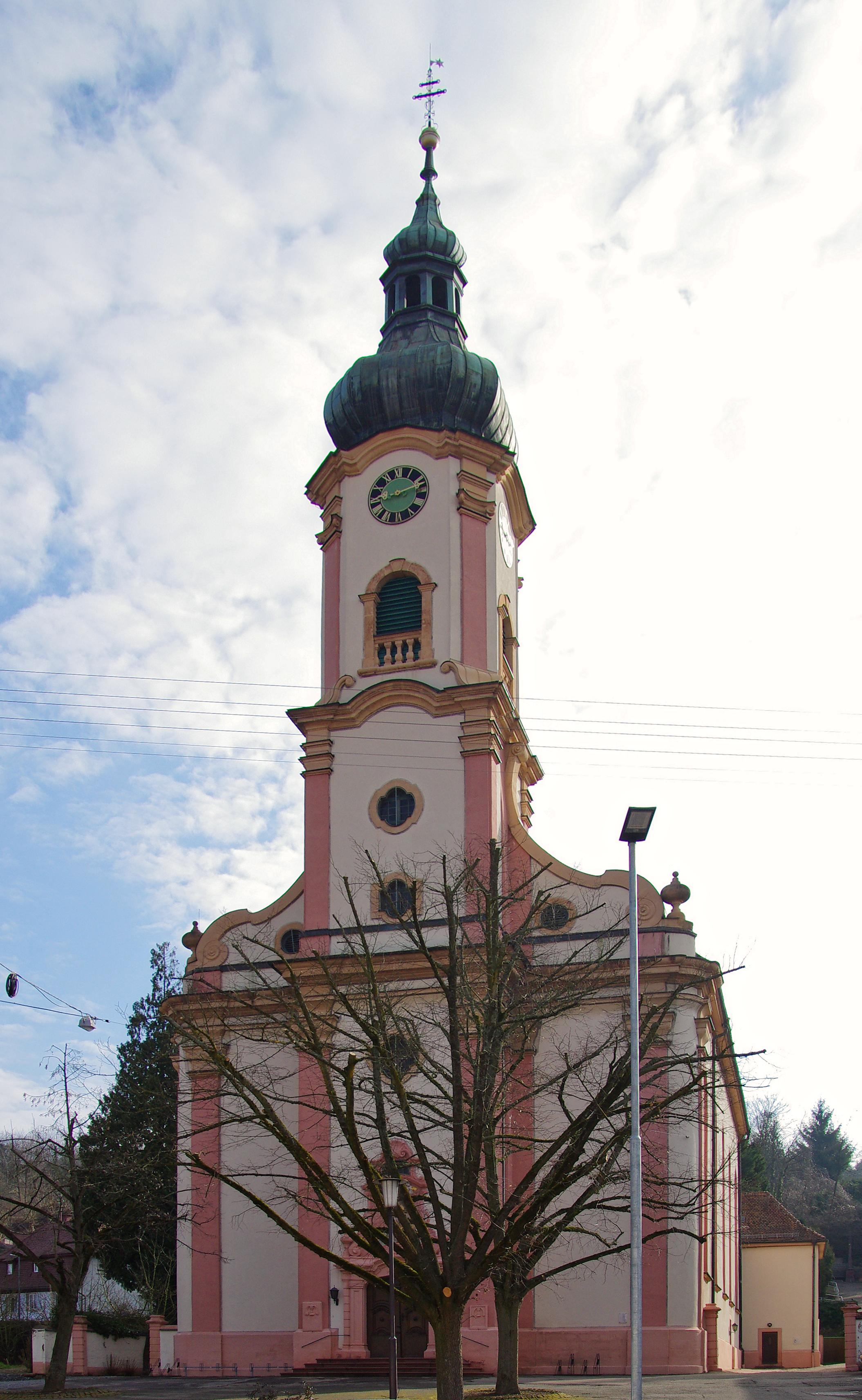 Bilder der katholischen Kirche St. Alexius in Herbolzheim